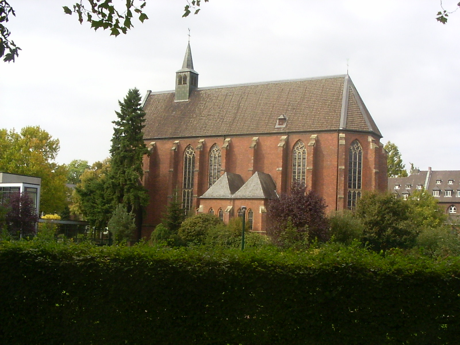 Collegium Augustinianum Gaesdonck, Kirche This is a photograph of an architectural monument.